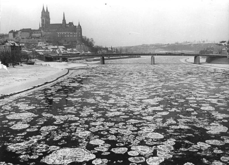 Meißen, Elbe, Winter Zentralbild Siegert 4.2.1956 Elbe hat Eisgang Einige Tage strenger Frost haben für Eisgang auf der Elbe genügt. Doch genausoschnell, wie der Frost kam, verschwand er wieder und so wird es wohl nicht zum Zufrieren reichen, sondern vorläufig bei den Eisschollen bleiben. UBz: Blick auf die Elbe bei Meissen.